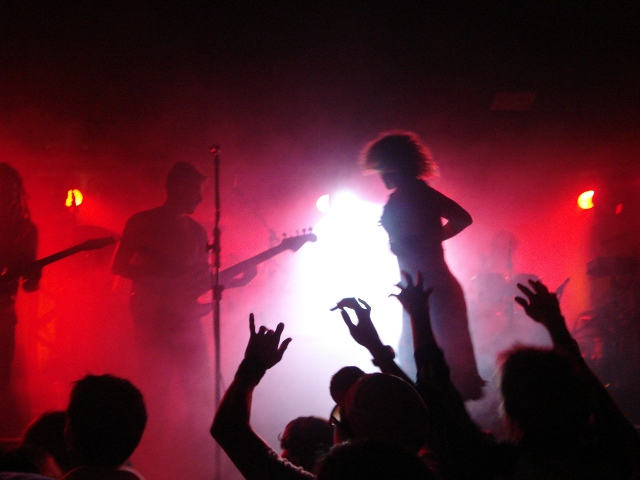 Show do Chimarruts em Ijuí